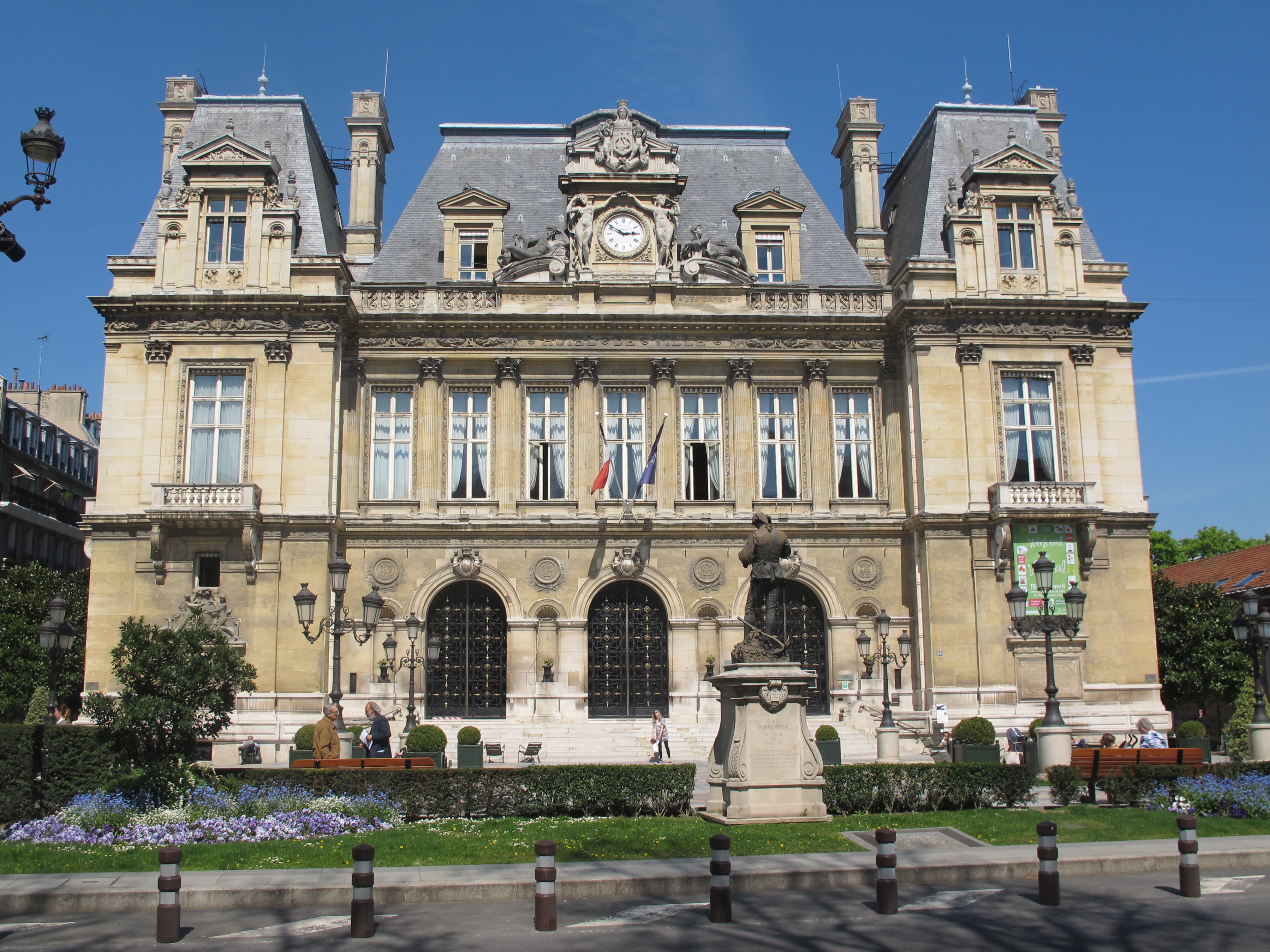 Mairie de Neuilly-sur-Seine.